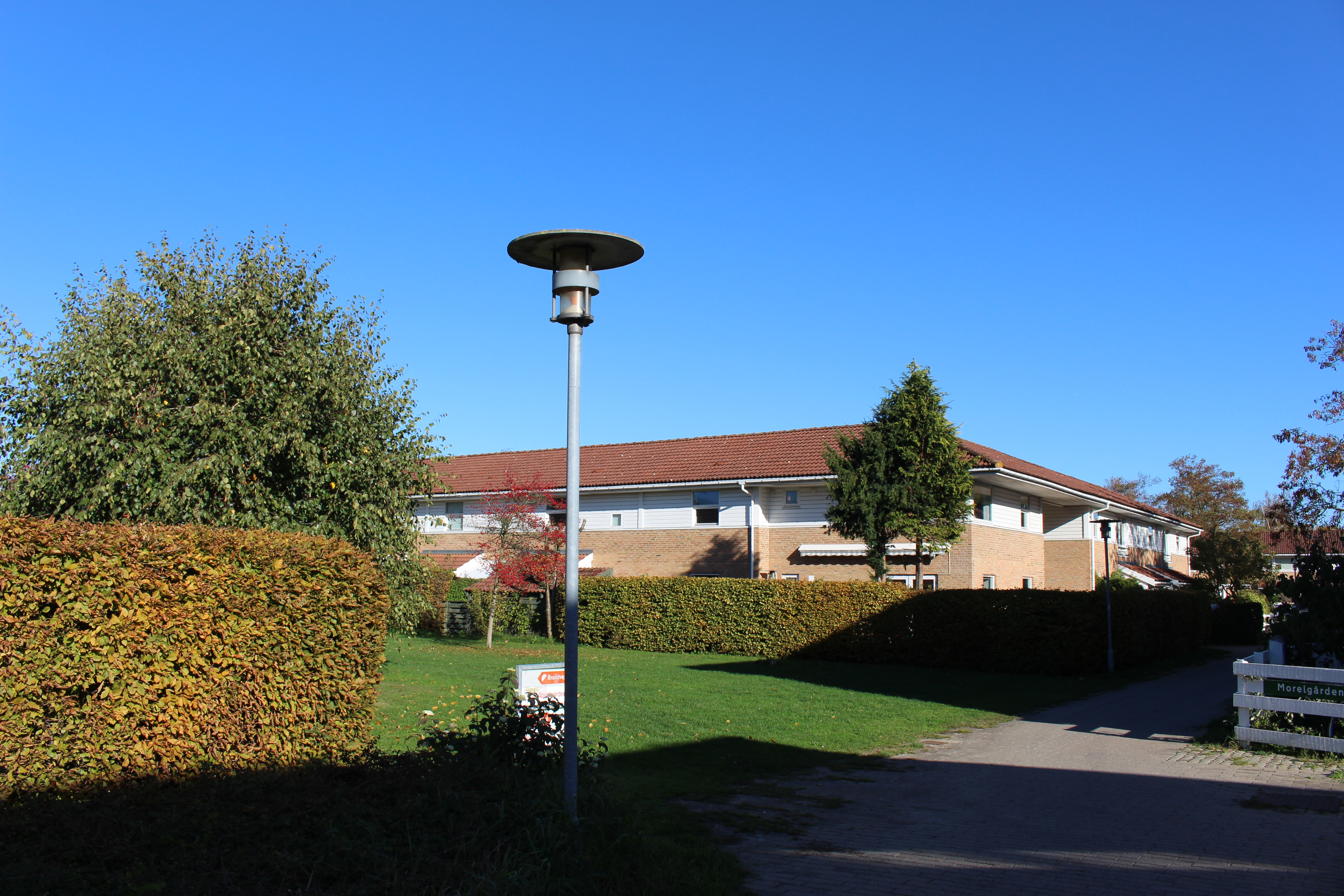 Albertslundlygten fra 1963